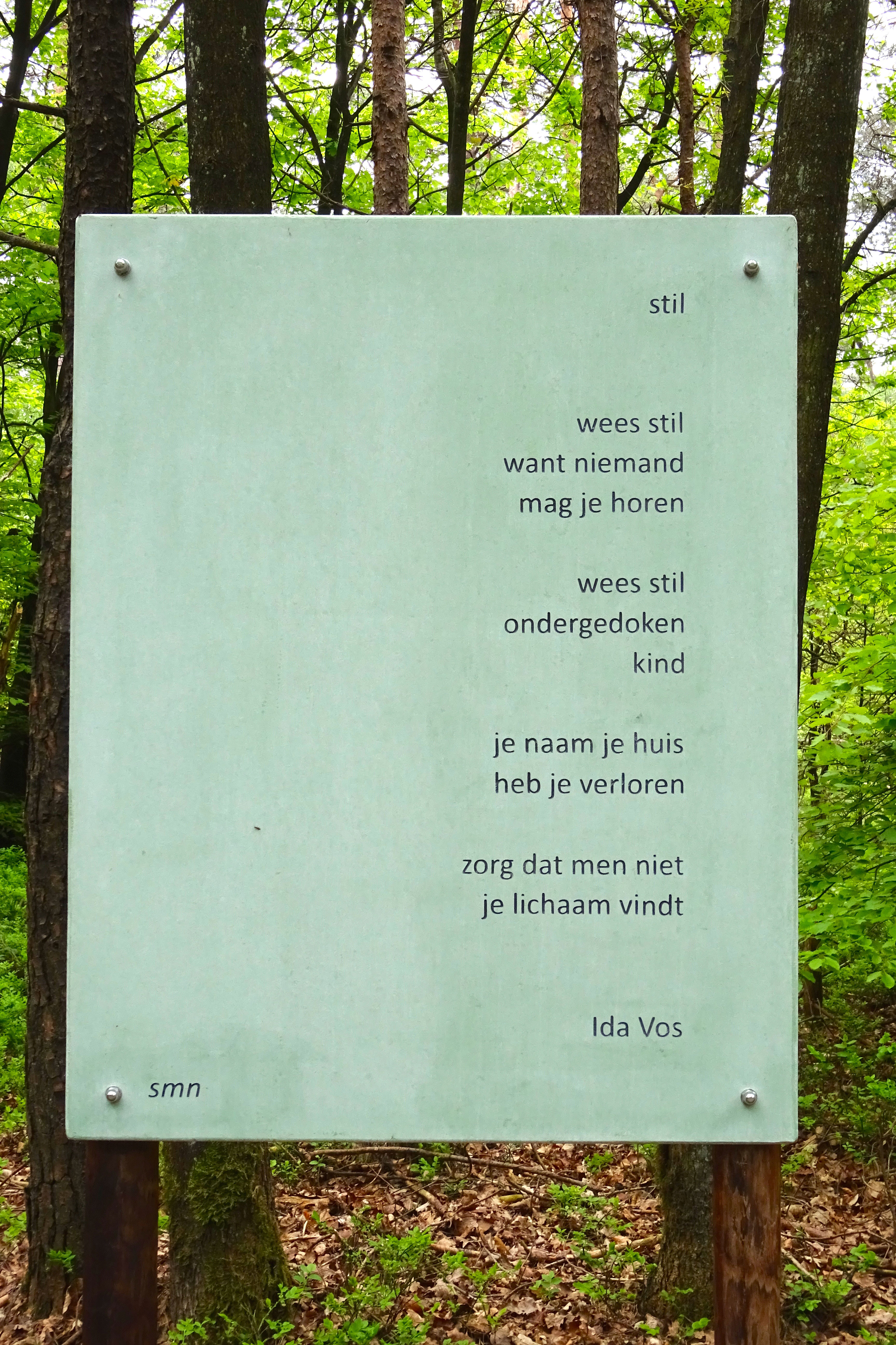 Gedicht door Ida Vos bij het verscholen dorp nabij Vierhouten